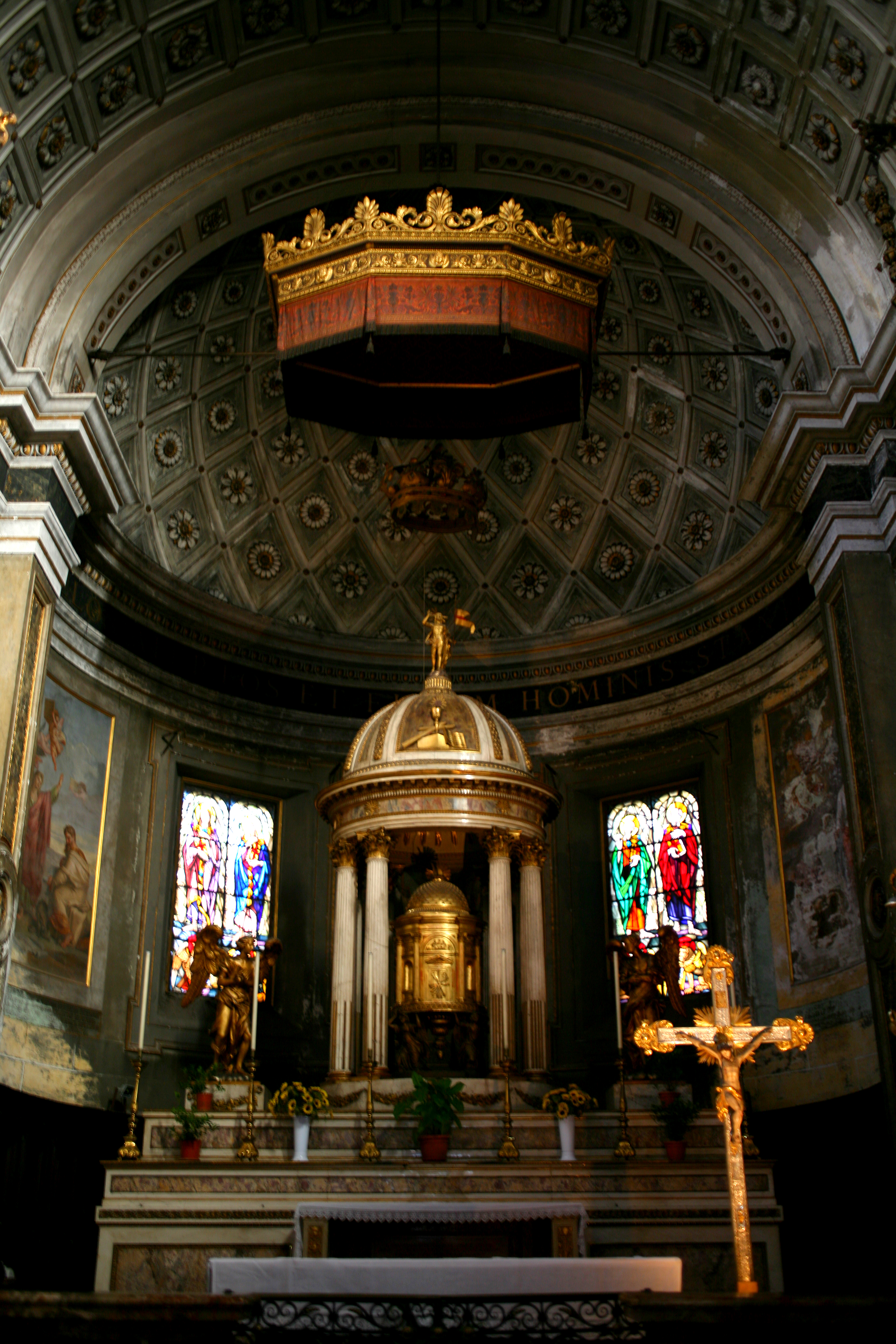 Basilica di Santo Stefano Maggiore, Milano, altare maggiore